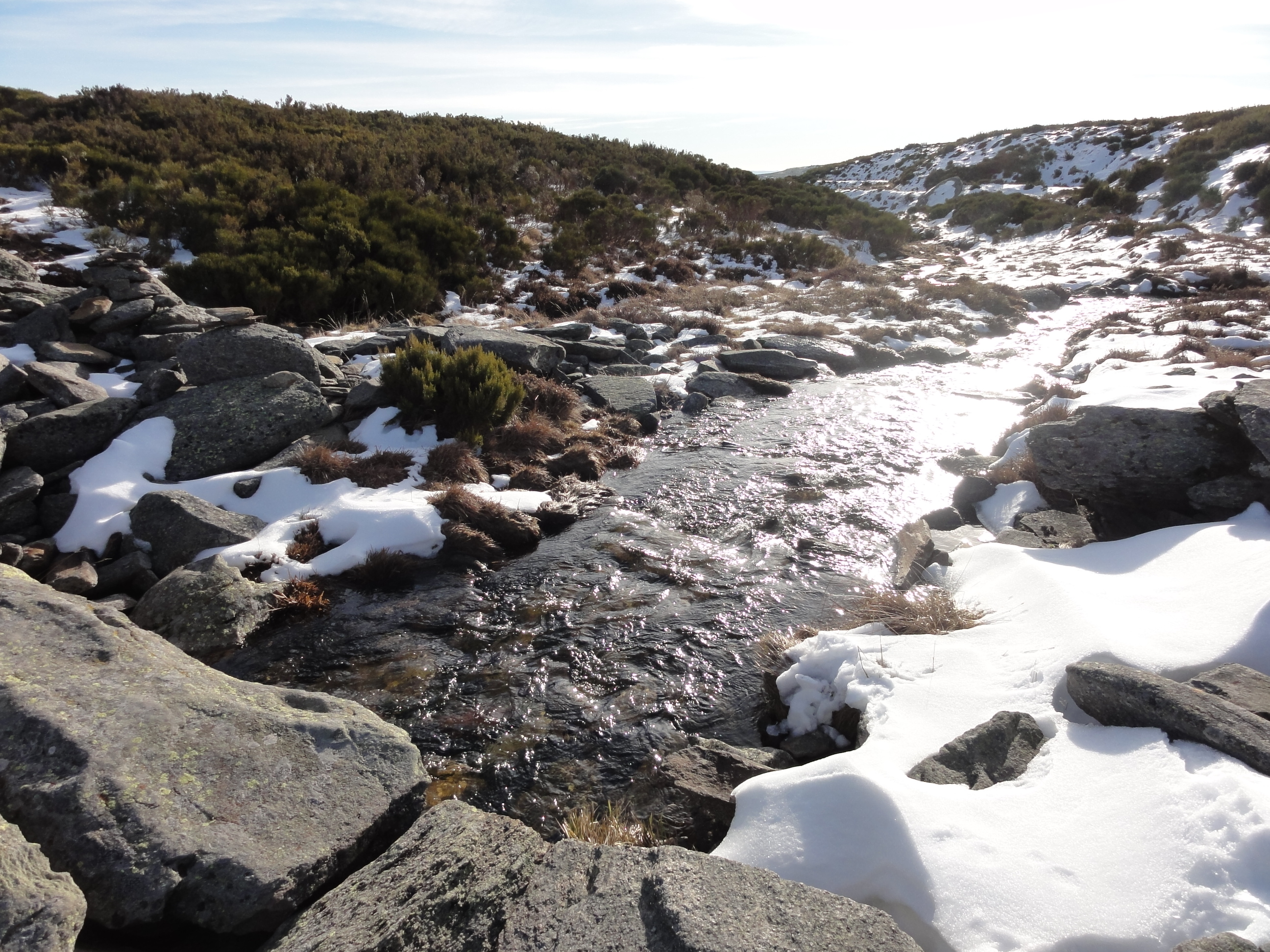 Cerca de la Laguna de las Yeguas, Lago de Sanabria This is a photography of a Special Area of Conservation in Spain with the ID: ES4190105. Natura2000 entry, EEA entry